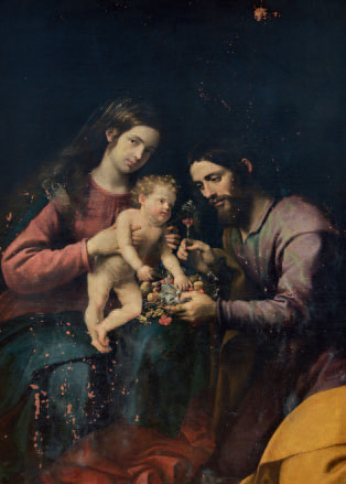 La obra representa a los tres miembros de la Sagrada Familia cristiana.